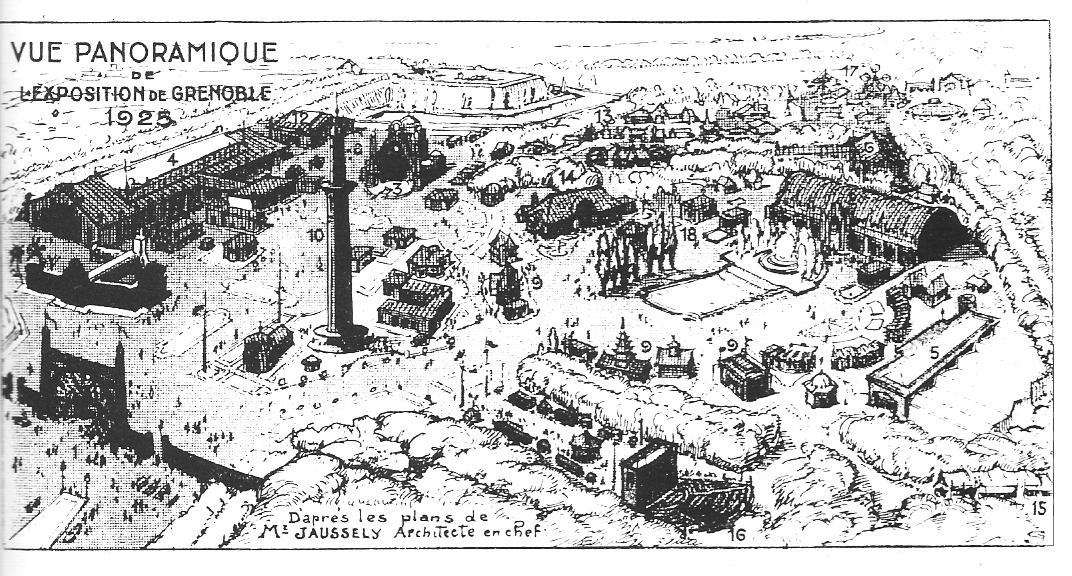 Plan de l'exposition internationale de la houille blanche à grenoble en 1925. Architecte : Léon Jaussely